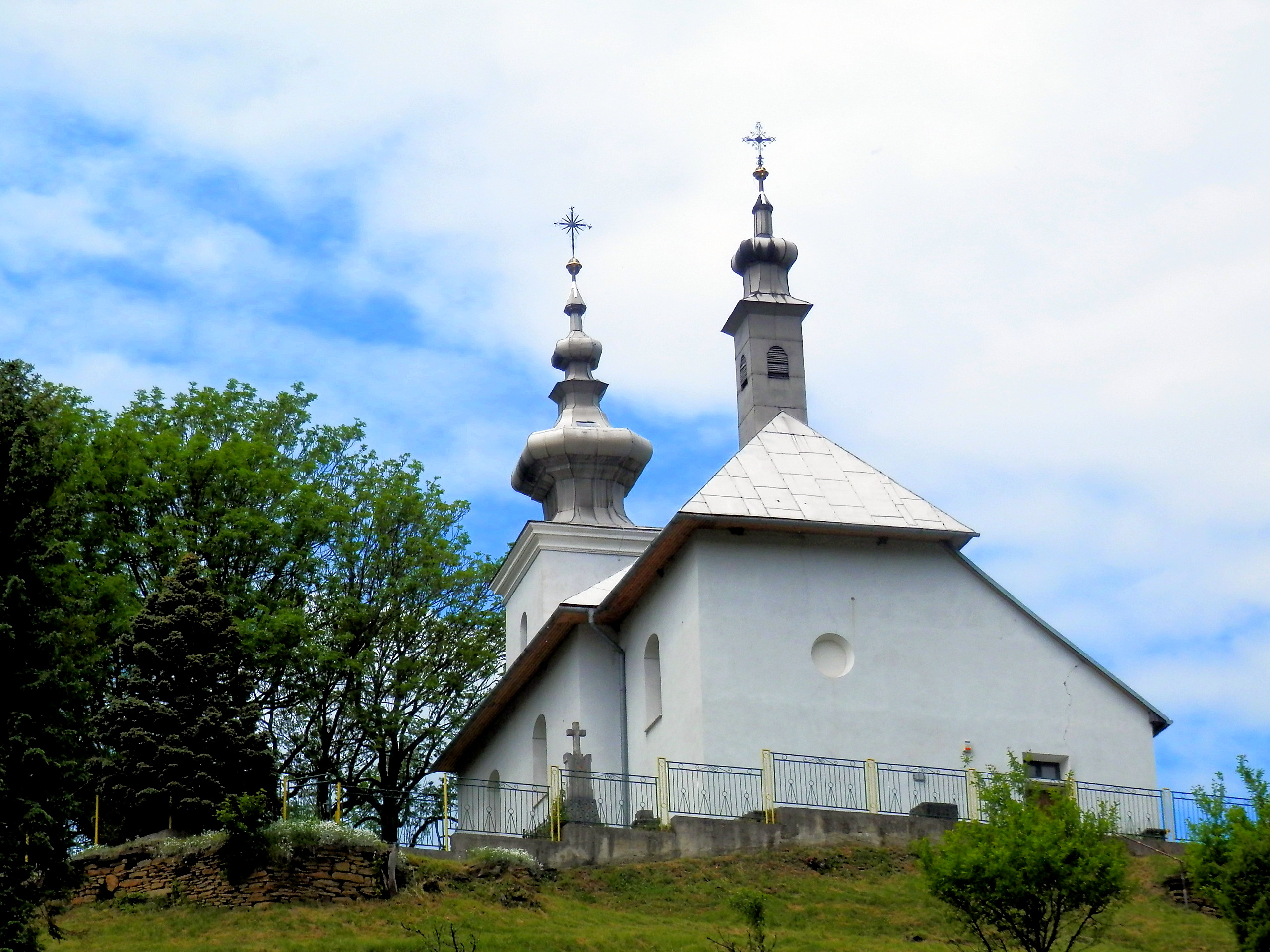 Národná kultúrna pamiatka, rímsko-katolícky kostol Nanebovzatia Panny Márie, doba vzniku 14.storočie, prevládajúci sloh barok, . Obec Poľanovce, okres Levoča